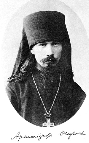 Архимандрит Феофан Быстров